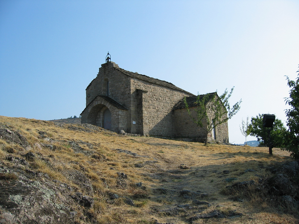 Chapelle Saint-Loup à Villefort en Lozère (France)